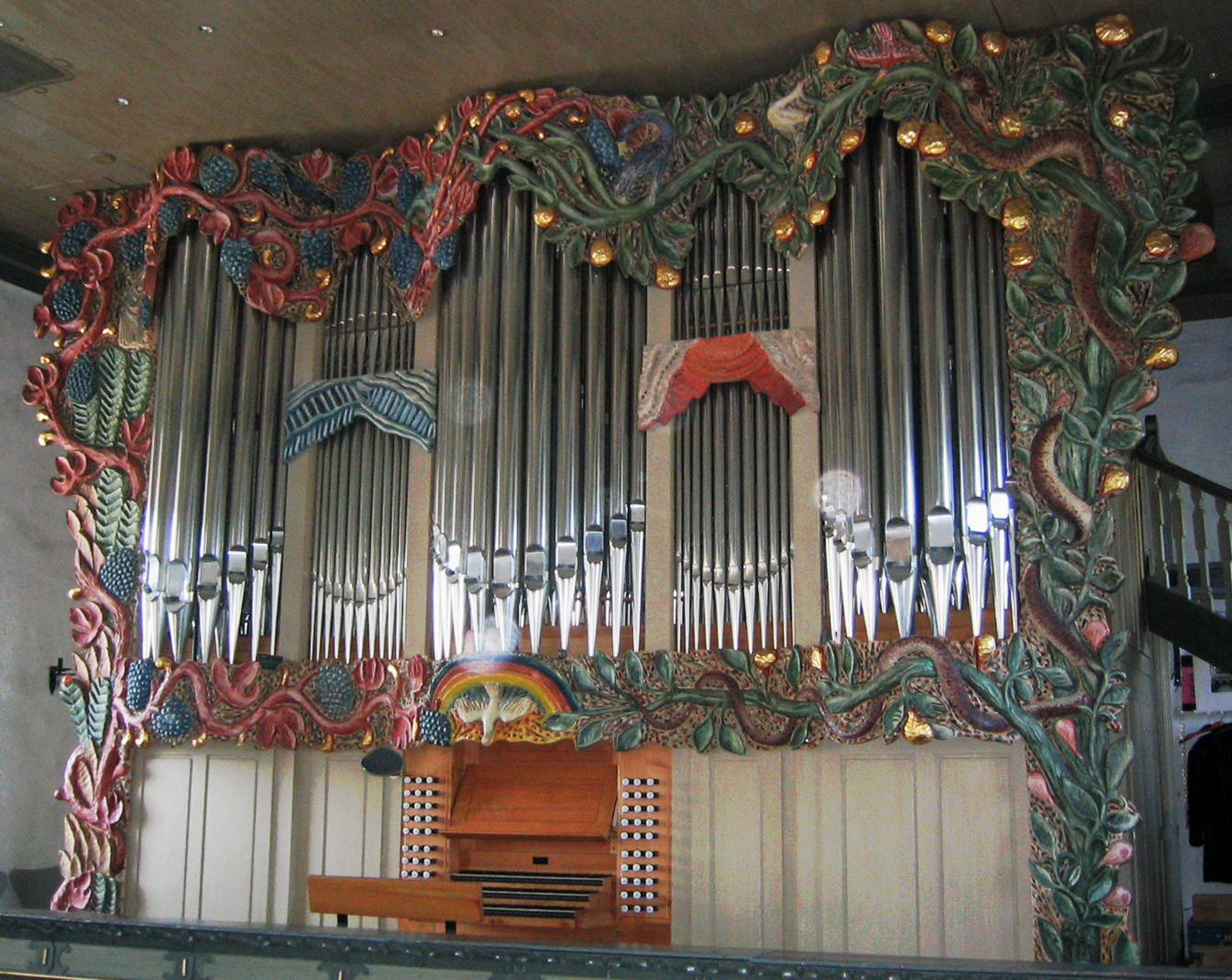 Orgel von St. Severin, Keitum, Schleswig-Holstein, Deutschland